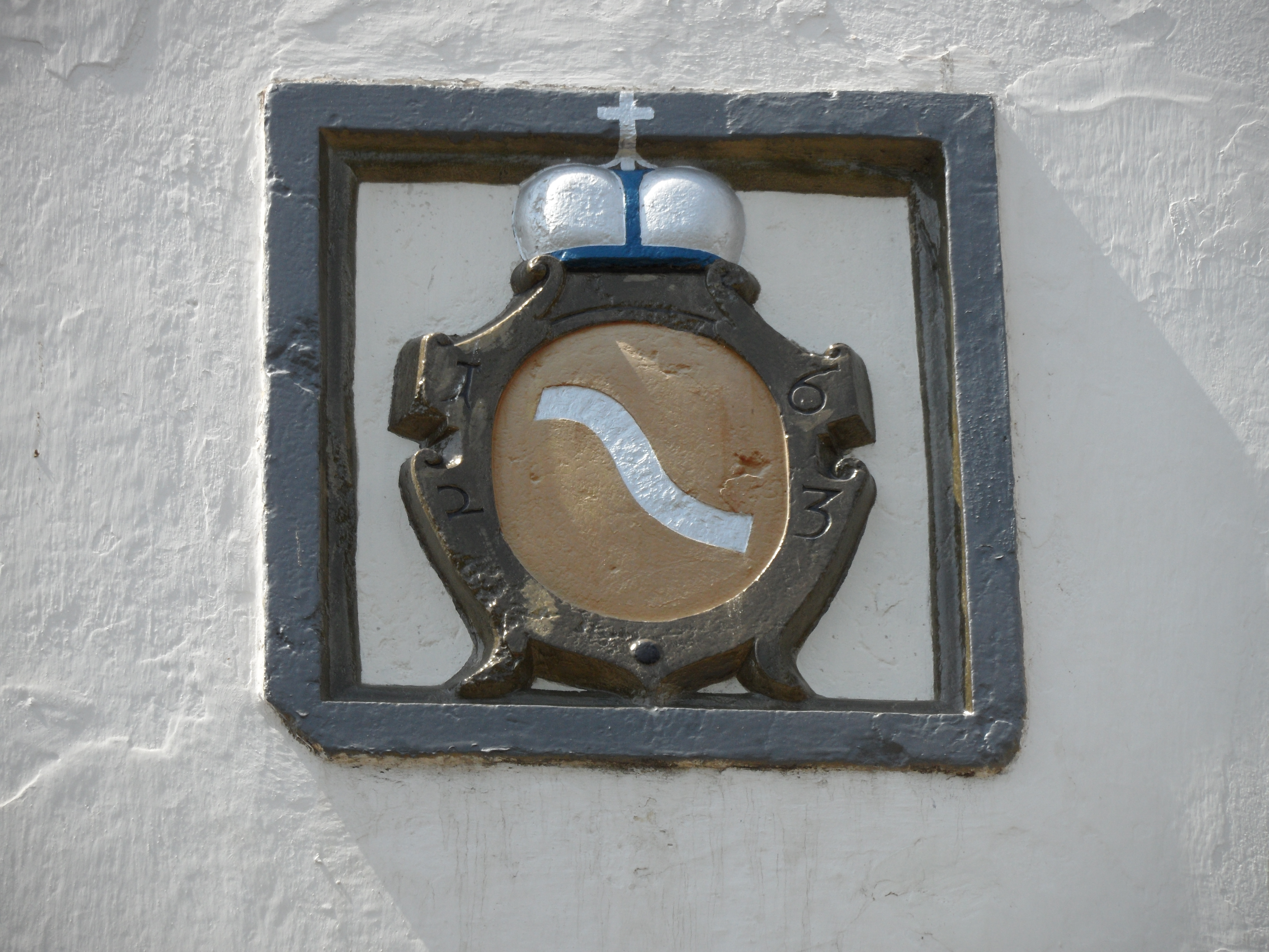 Замок князів Острозьких-Любомирських (мур.), Дубно, вул. Шевченка